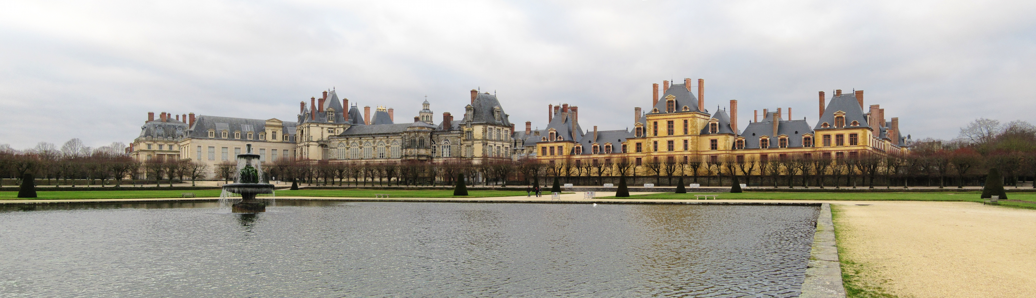 Vue du palais de Fontainebleau depuis le parc.